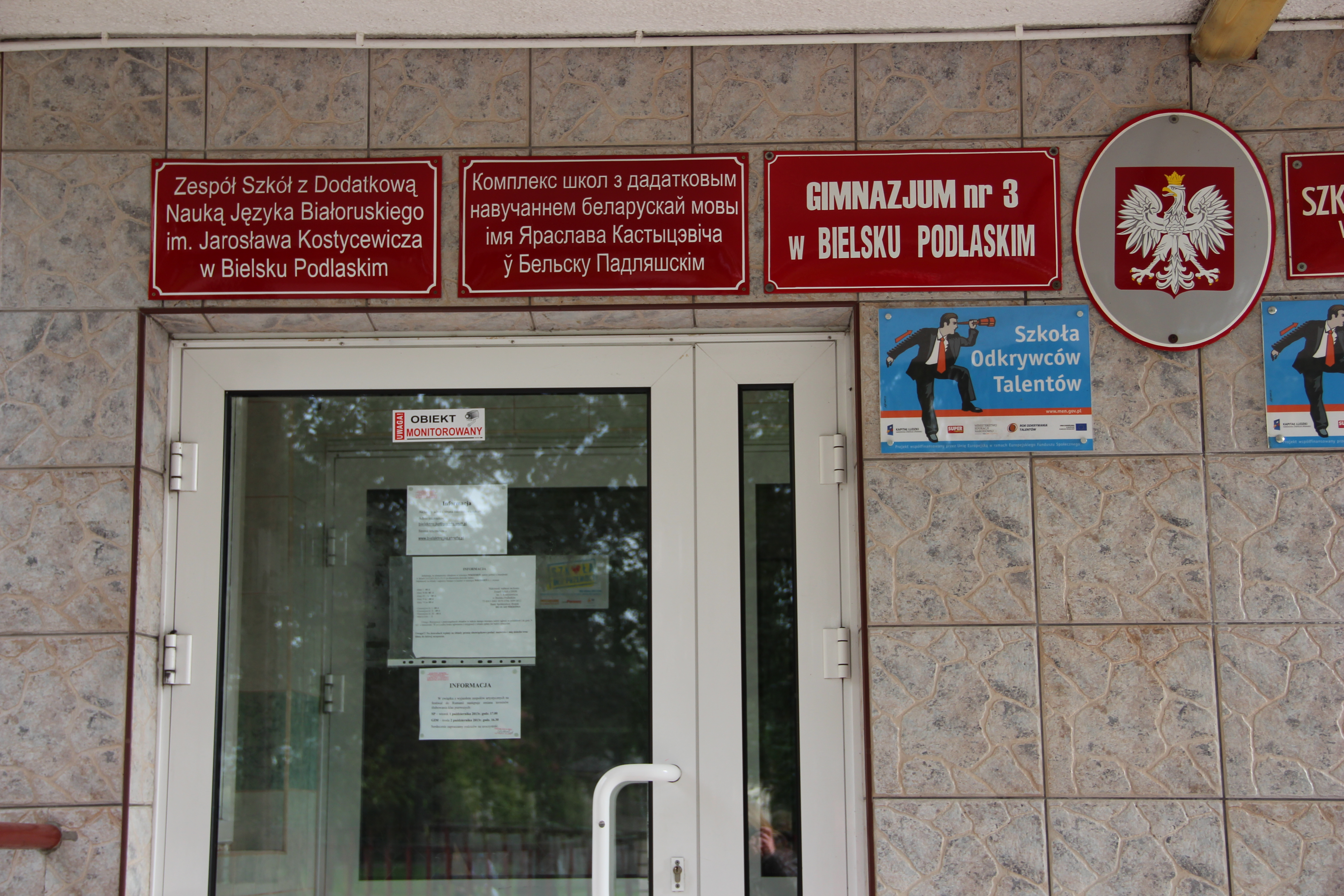 II Liceum Ogólnokształcące w Bielsku Podlaskim.